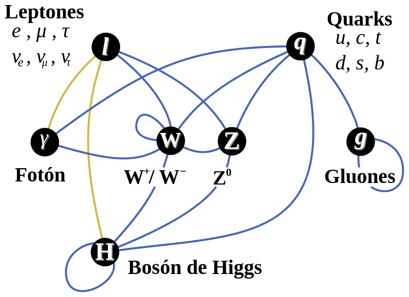 las partículas del modelo estándar al ser los bloques que lo construyen todo interaccionan entre ellas y esas interaciones son muy especificas y esta imagen las describen